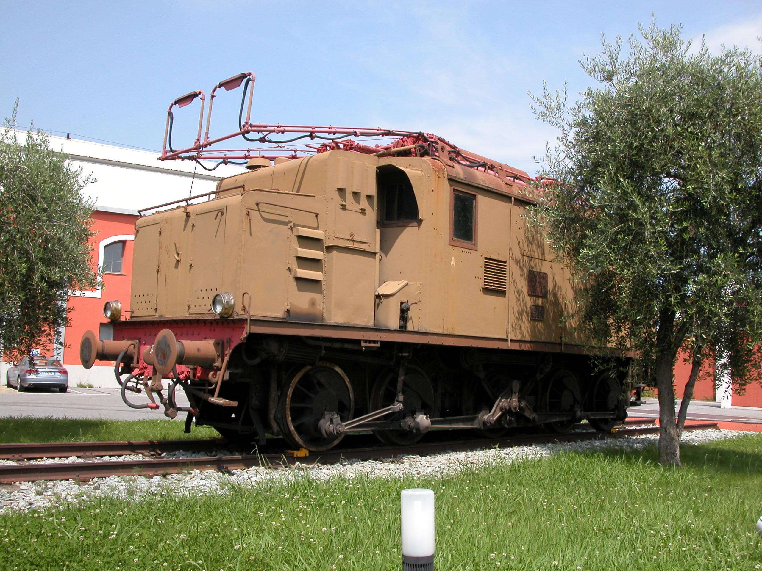 Locomotiva E.554.174 esposta nello stabilimento Bombardier (ex Tecnomasio Italiano Brown Boveri) di Vado Ligure.